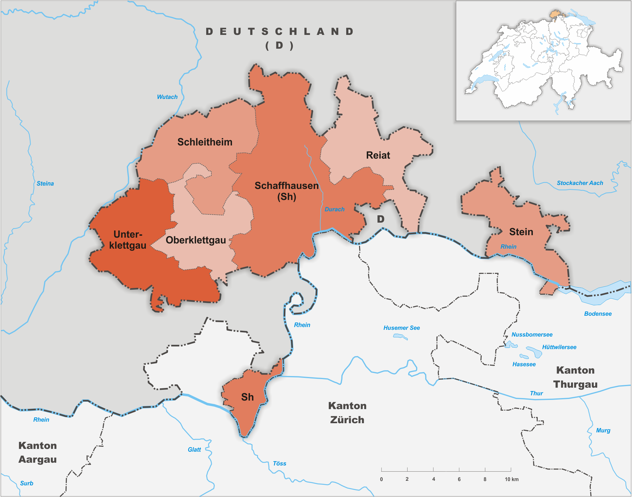 Bezirke des Kanton Schaffhausen ab 2013